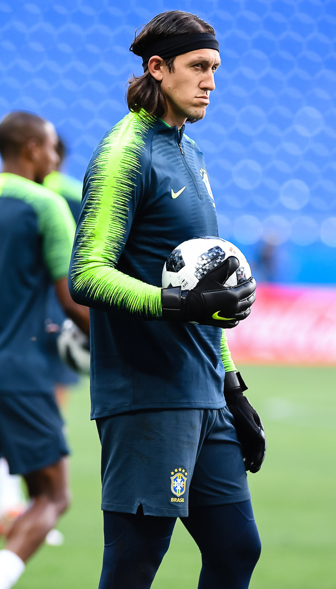 Бразилия и Швейцария готовятся к очной встрече на «Ростов Арене»